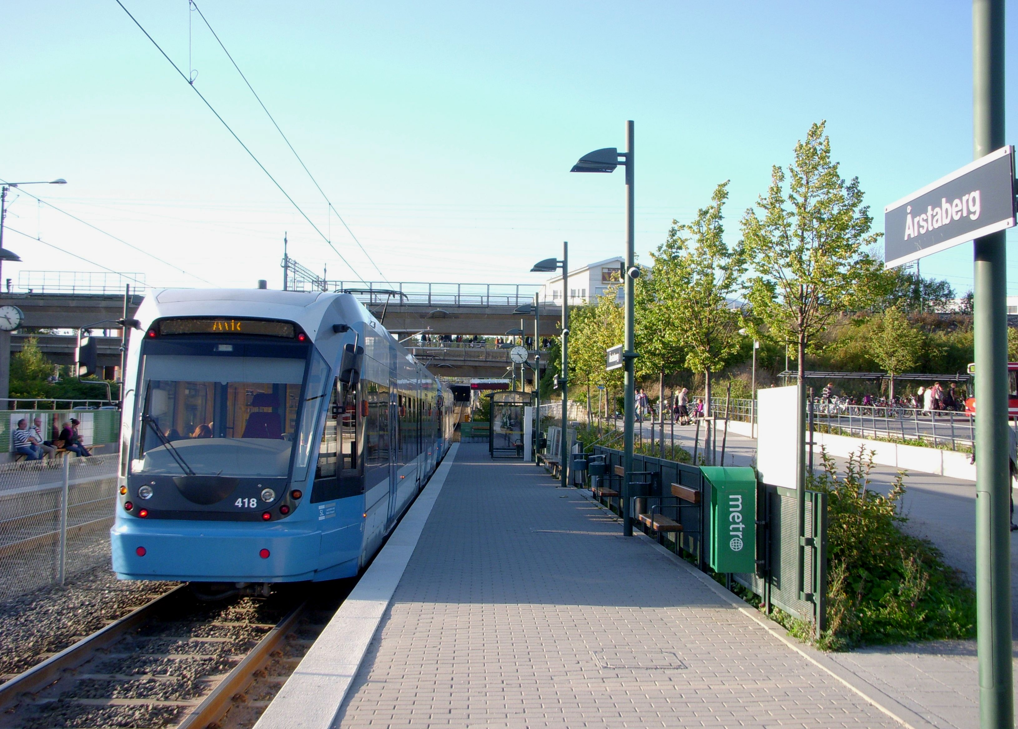 Tvärbanans station "Årstaberg", Stockholm